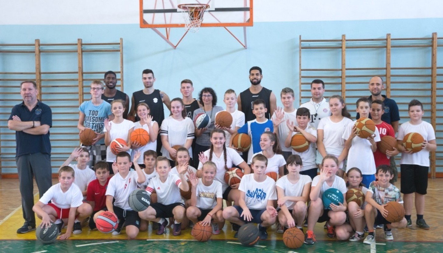 Spójnia w SP nr 2